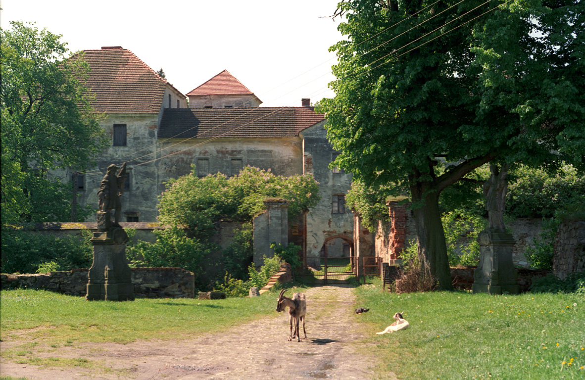 Witostowice